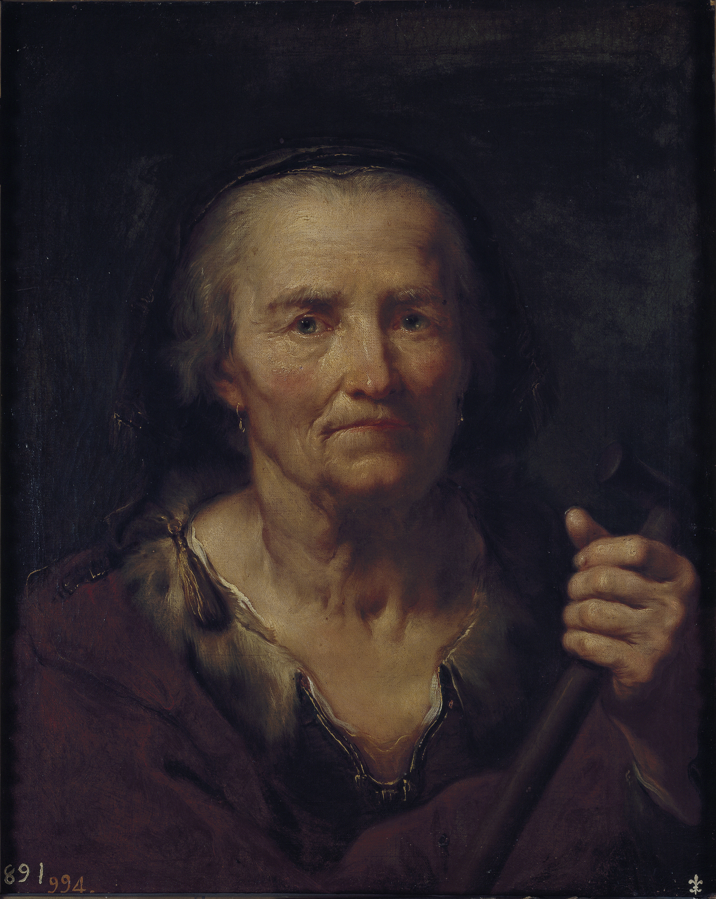 Vieja con una muletalabel QS:Les,"Vieja con una muleta"